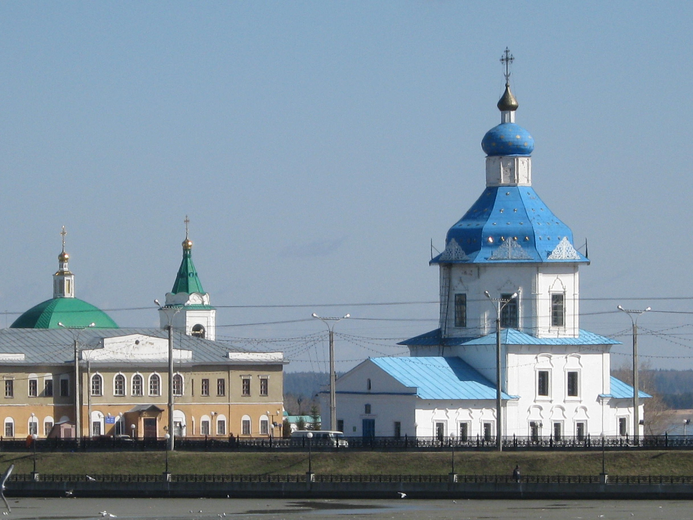 Успенская церковь (г.Чебоксары)